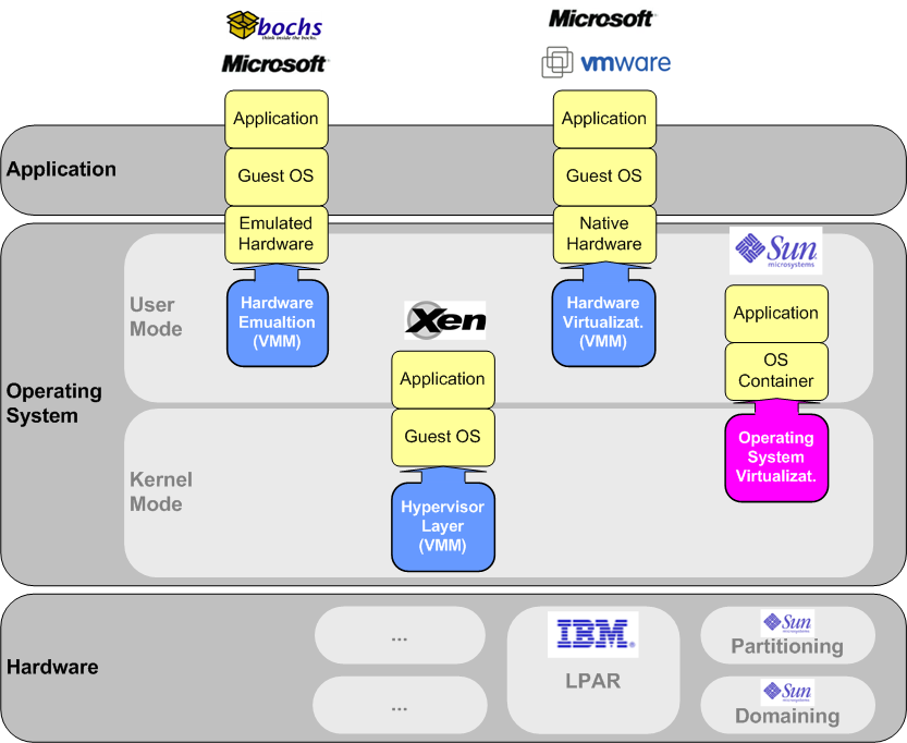 Übersicht von Virtualisierungstechniken zur Schaffung virtueller Betriebsumgebungen